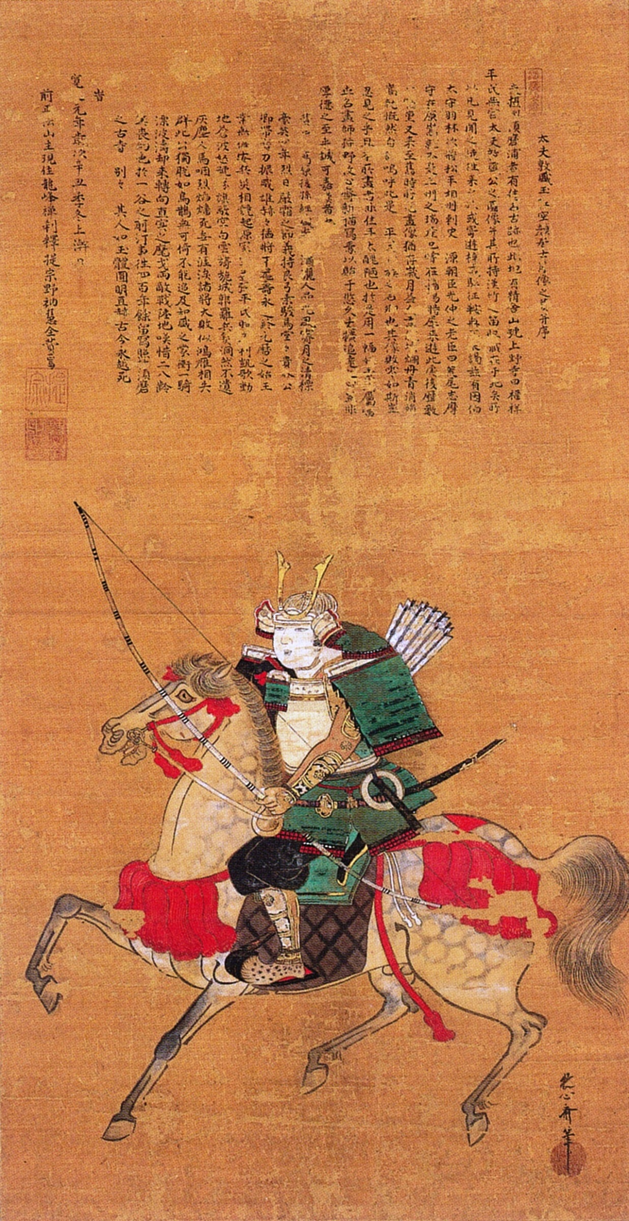 平敦盛の肖像画